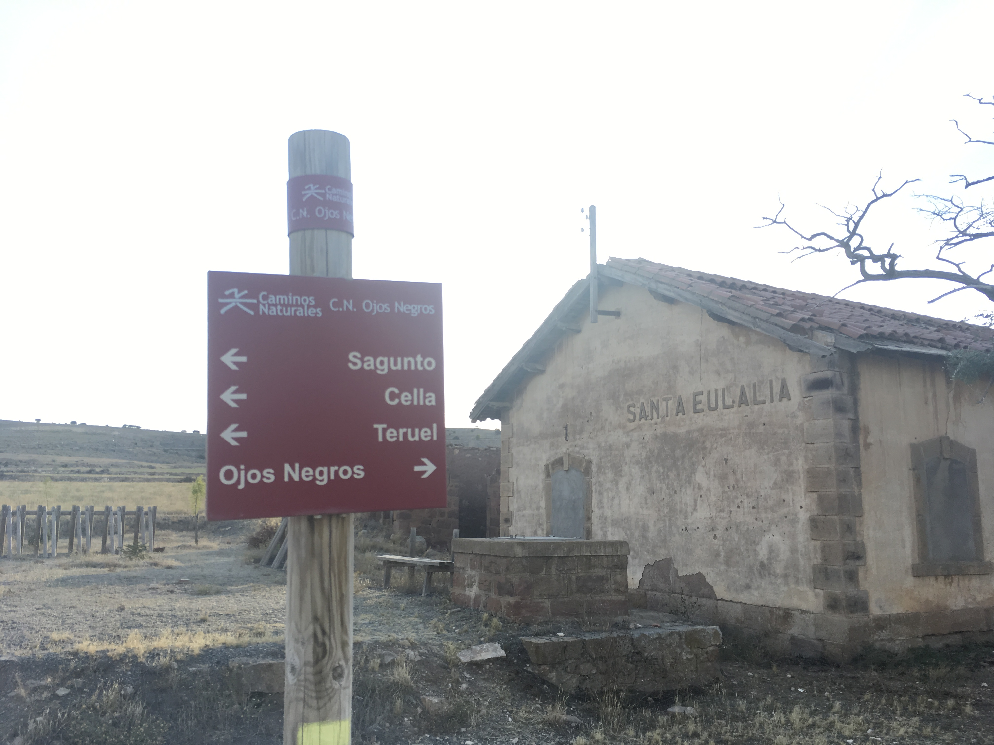 Camino Verde Sierra Menera Estación de Santa Eulalia del antiguo ferrocarril de Sierra Menera, de Sagunto a Ojos Negros Santa Eulalia del Campo (Teruel)